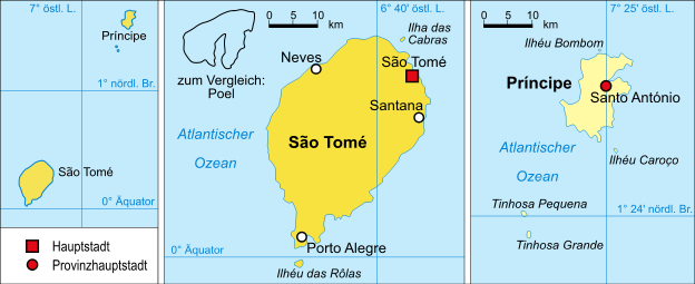 Politische Karte von Sao Tome und Principe (Provinz Sao Tome hervorgehoben)